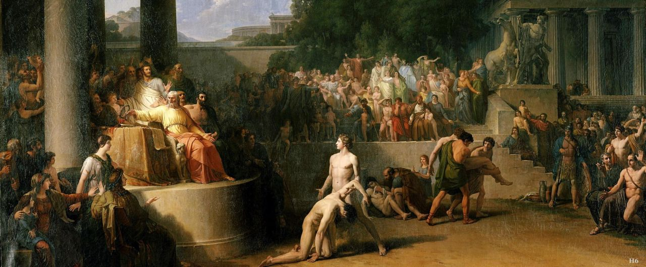 Les Jeux olympiques, 1786-1791 Huile sur toile, 209,5 x 386 cm Acquis par François Tronchin en 1791 Genève, Musées d’art et d’histoire, Inv. 1826-1 . Don Jean-Louis-Robert Tronchin photo : Jean-Marc Yersin